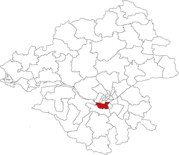 Carte de localisation du canton de Rezé (France, Loire-Atlantique)